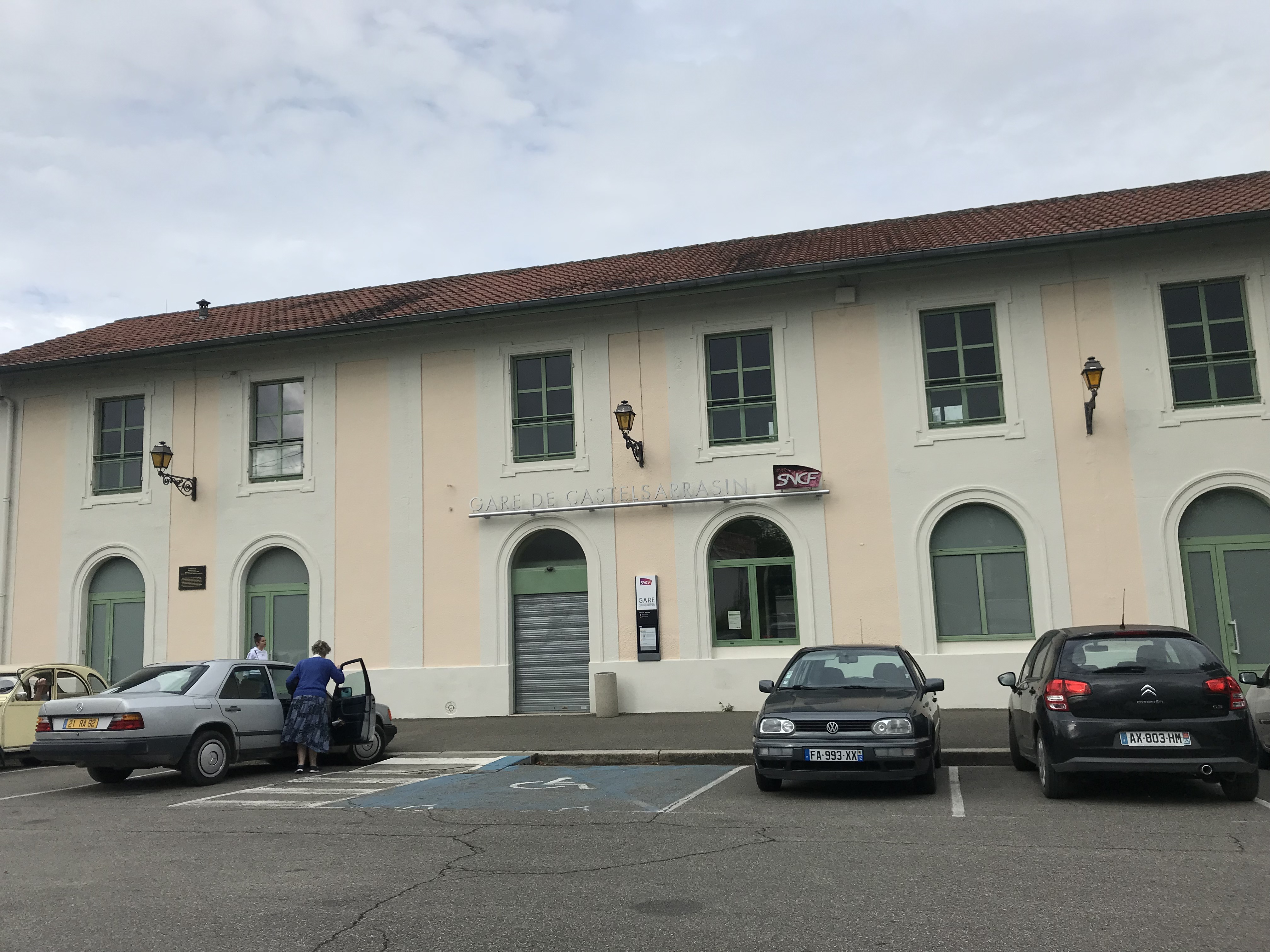 Bâtiment de la gare de Castelsarrasin